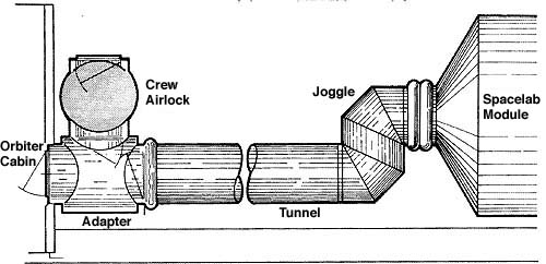 Spacelab access tunnel